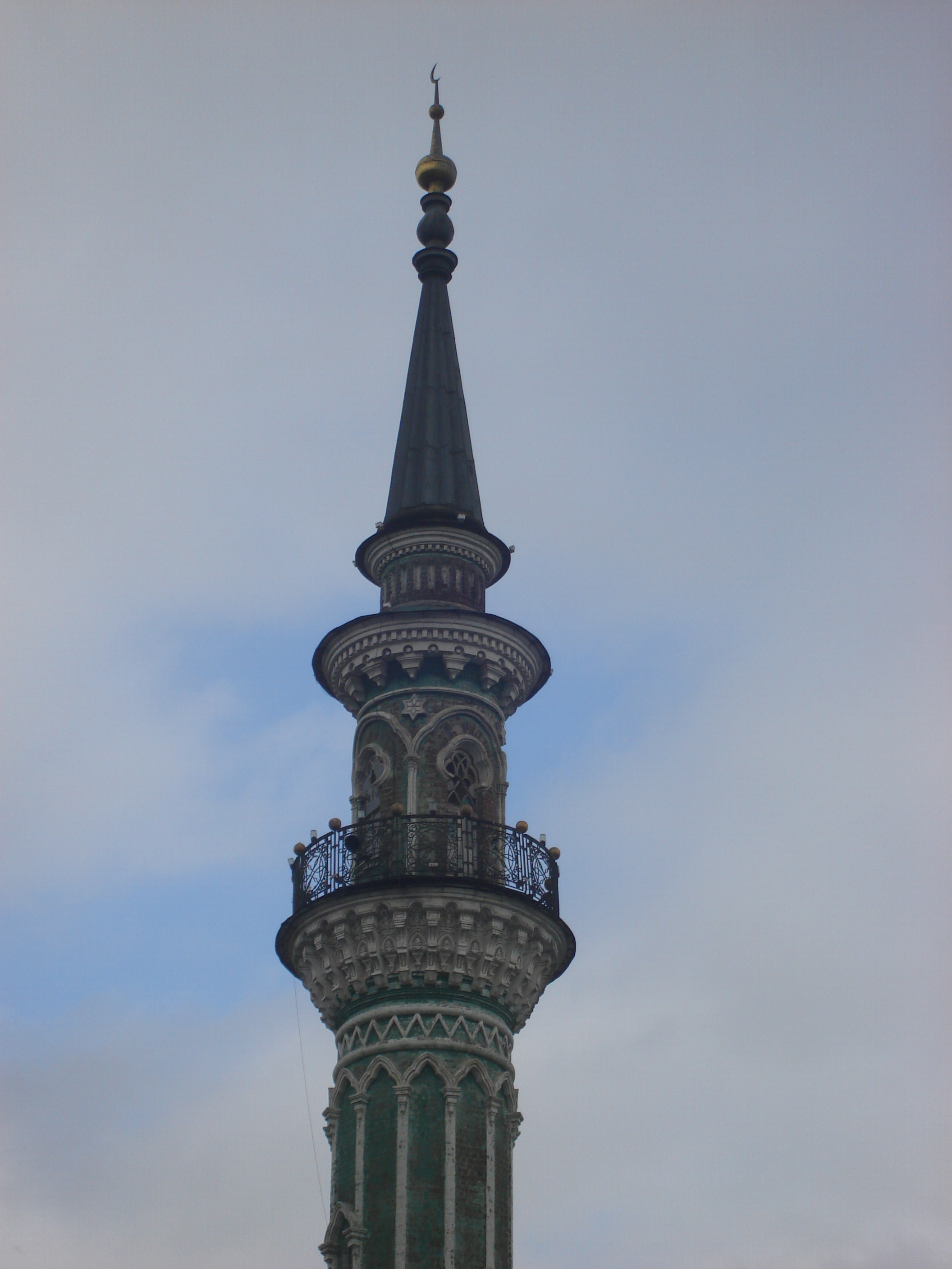 Äcem Mosque, Äcem mäçete